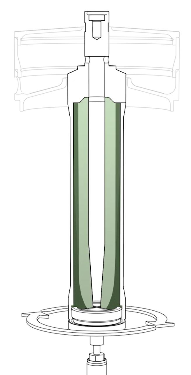 Rotor LE GP